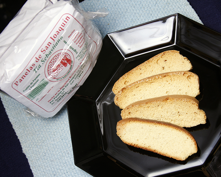 Las Panelas de San Joaquín son un bizcocho de receta con orígenes español que se cree fue traída por las primeras familias que se establecieron en San Joaquín – Estado Carabobo en 1795 adaptando algunos ingredientes de nuestro país. Se ha convertido en patrimonio de un pueblo, con su tradicional sabor, forma de empacado y hasta el estilo de ser ofrecido por el vendedor ambulante de carretera que gira a un ritmo particular la bolsa de producto para llamar la atención.